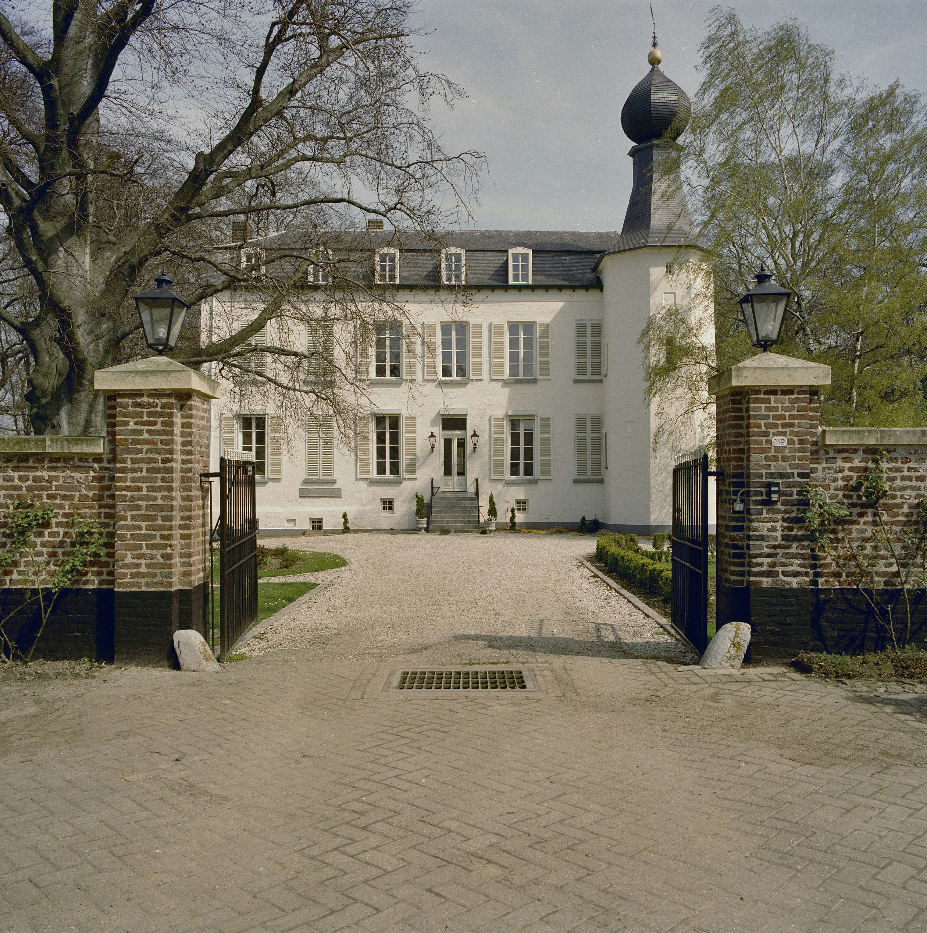 Kasteel Reijmersbeek: Exterieur OVERZICHT HOOFDHUIS, VANAF DE COUR